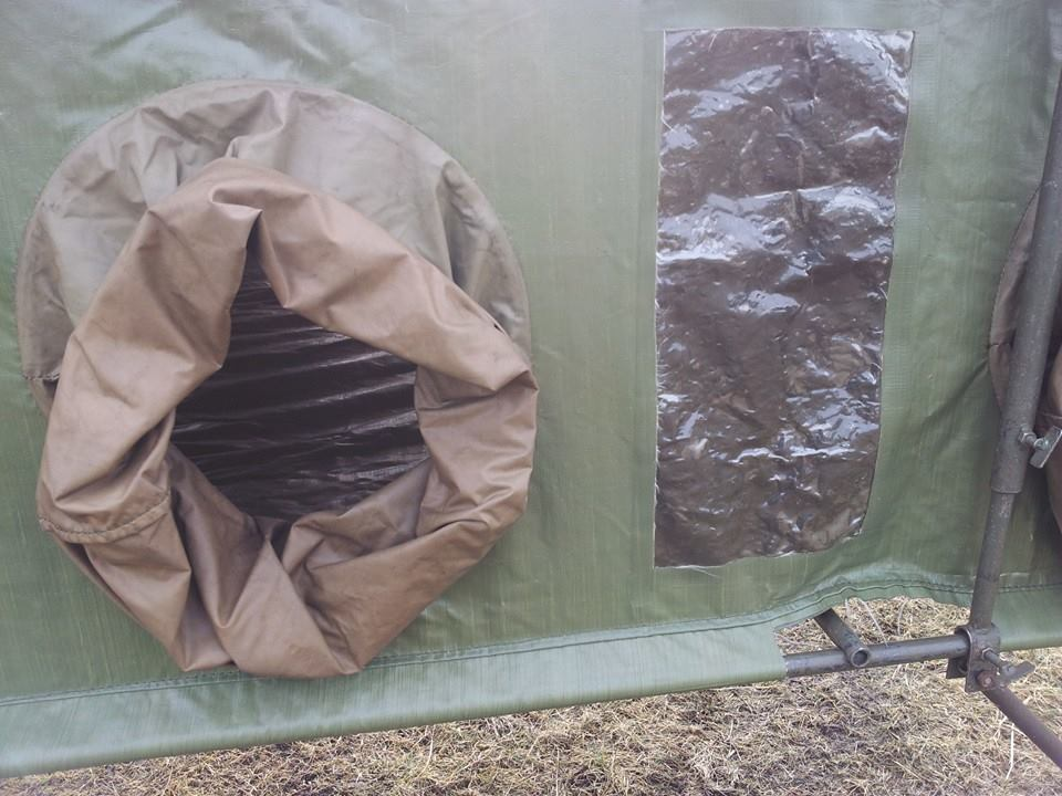 Widok rękawa i "szybki" komory grupowej KG-12